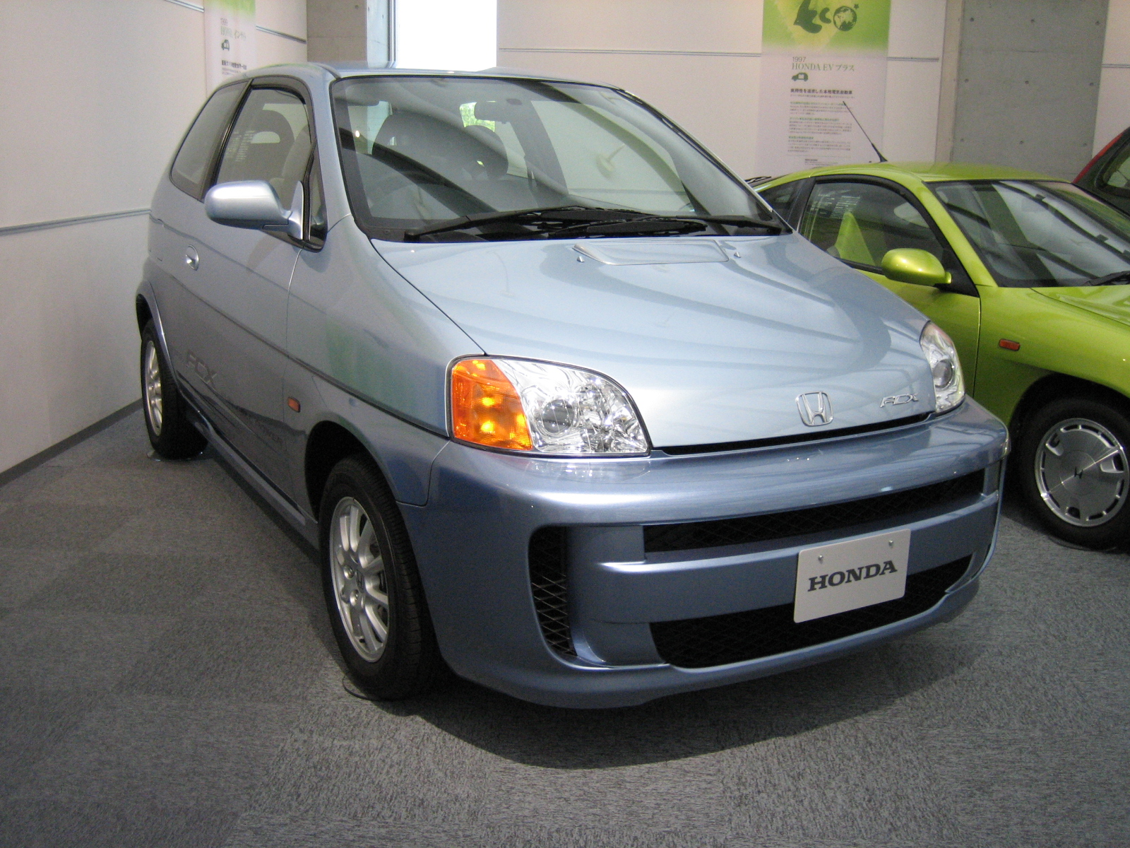 Honda FCX fiest model